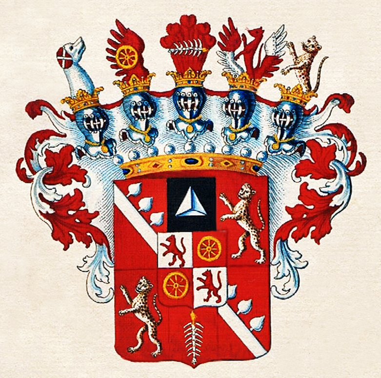 Wappen der Grafen Kollonitz von Kollograd 1637, ab 1728 das eines Zweiges der Familie Zay von Csömör